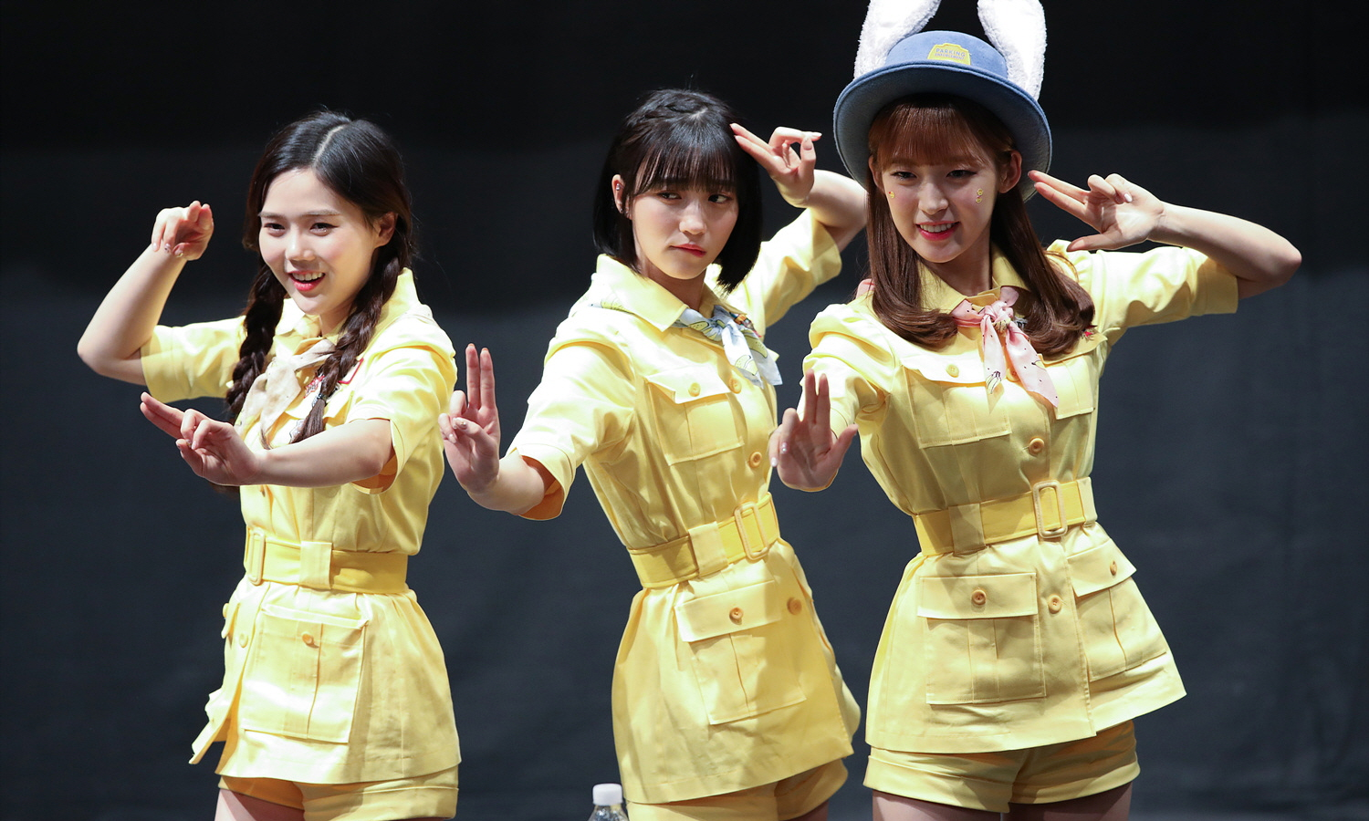 180415 청담아트홀 오마이걸 반하나 팬싸인회